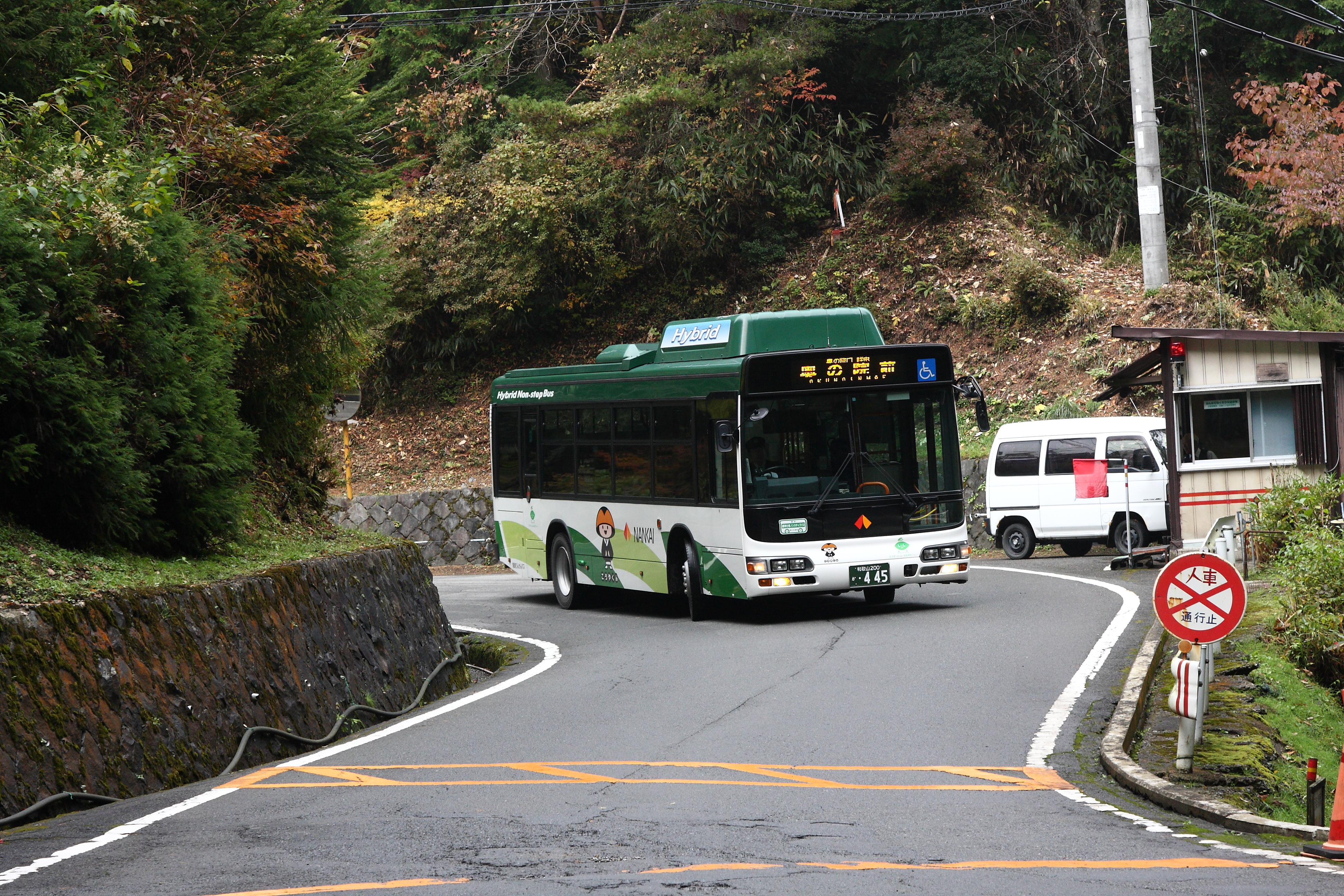 高野山駅から来た「奥の院前」行きバス。